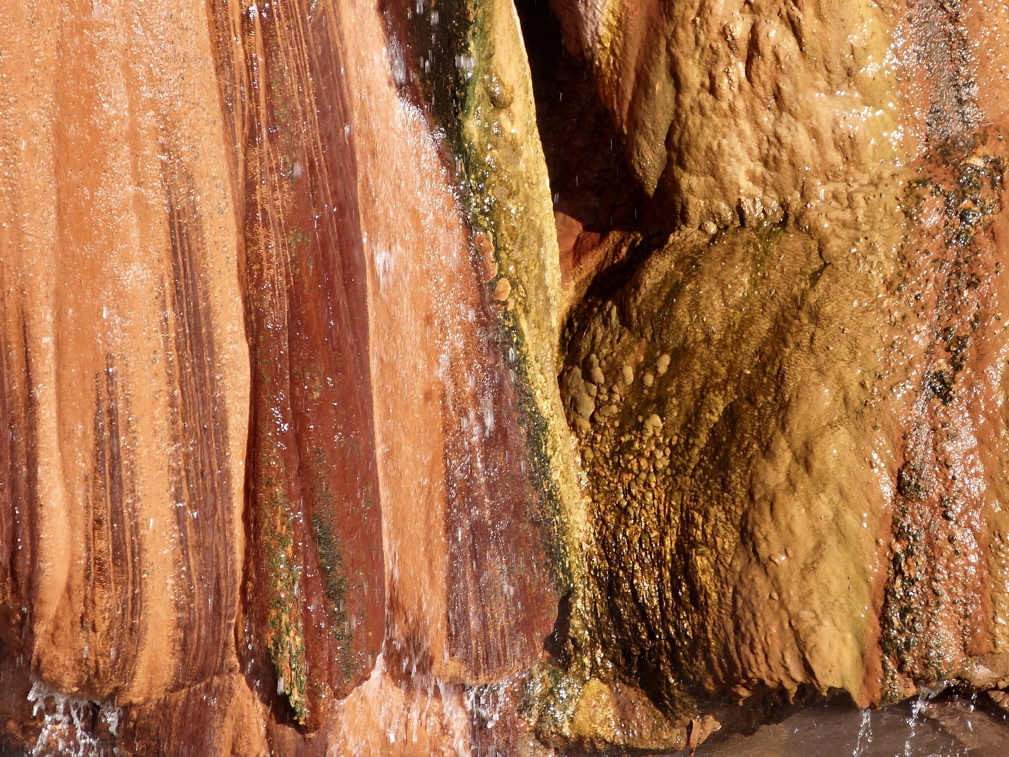 Deposito en cascada de travertino en Puente del Inca